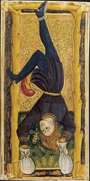 Charles VI (or Gringonneur) Deck; Le tarot dit de Charles VI